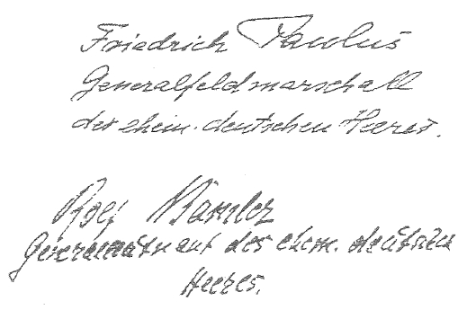 Unterschrift Rolf Bamler alias Rudolf Bamler und Paulus vom 20. Dezember 1949